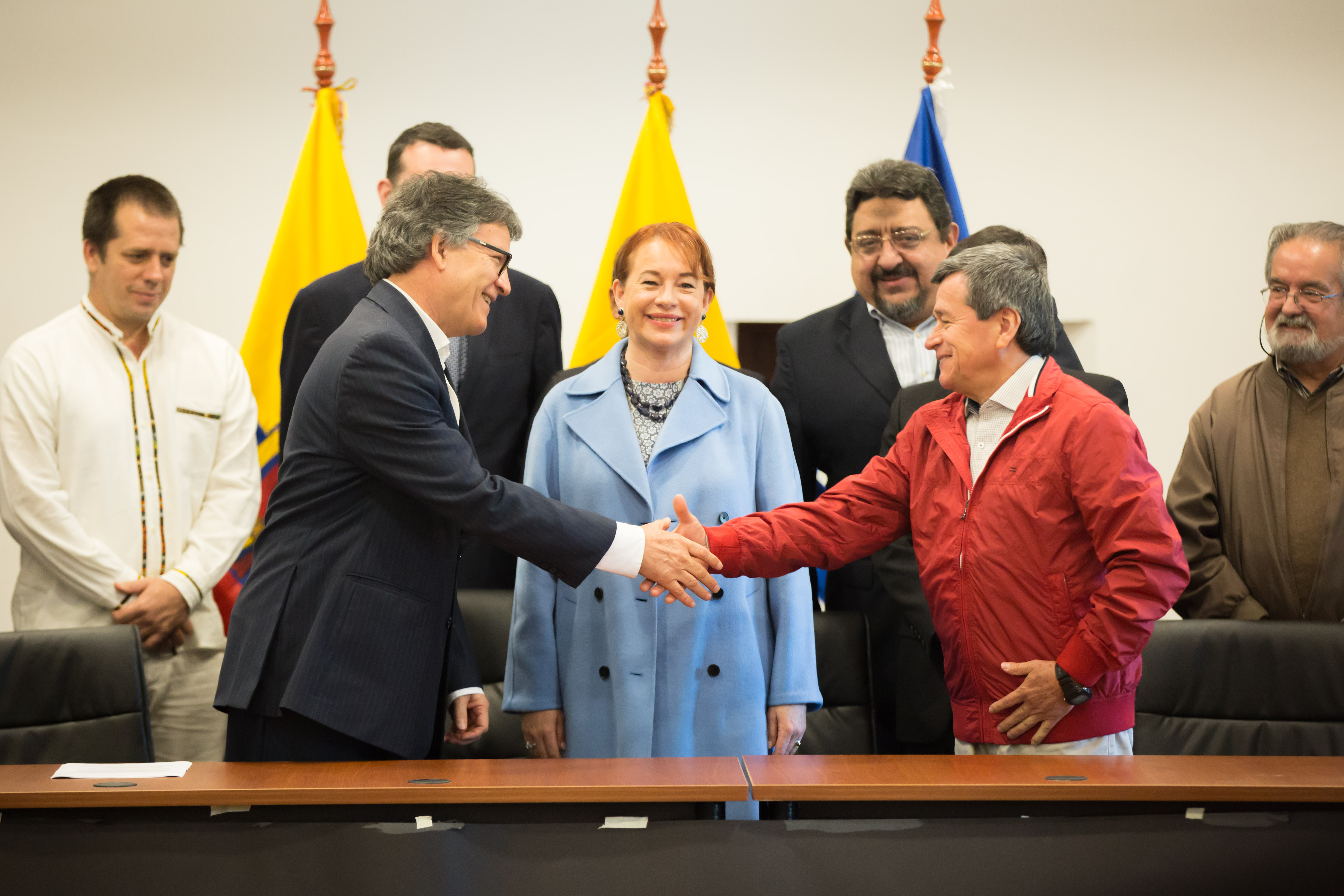 5to ciclo de negociaciones de paz entre el ENL y el Gobierno de Colombia